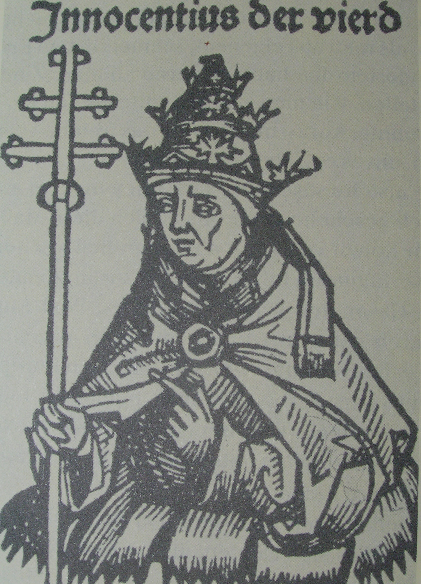 Інокентій IV.